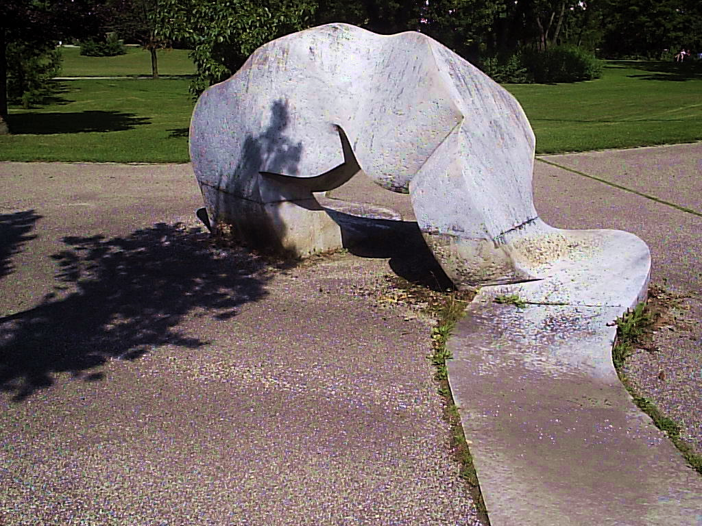 Plastik "Gesteinsader" von Hans Rucker im Patientengarten im Klinikum Großhadern in München.